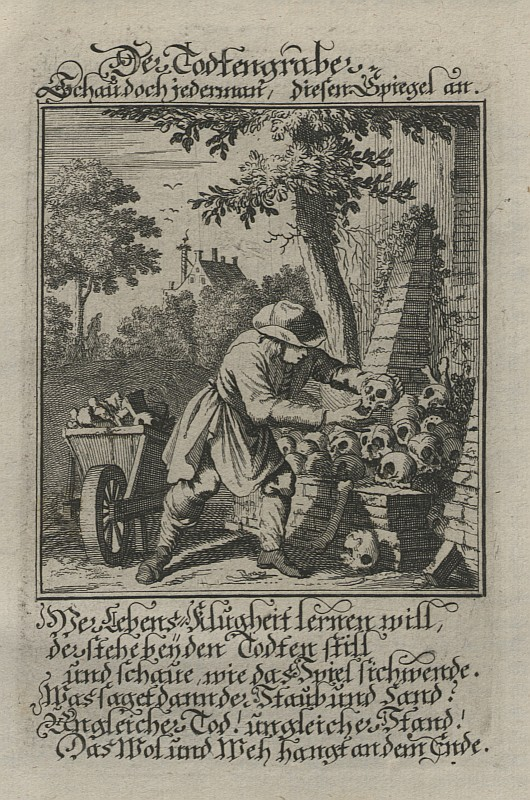 Original image description from the Deutsche FotothekStändebuch & Beruf & Handwerk & Totengräber & Kuhlengräber